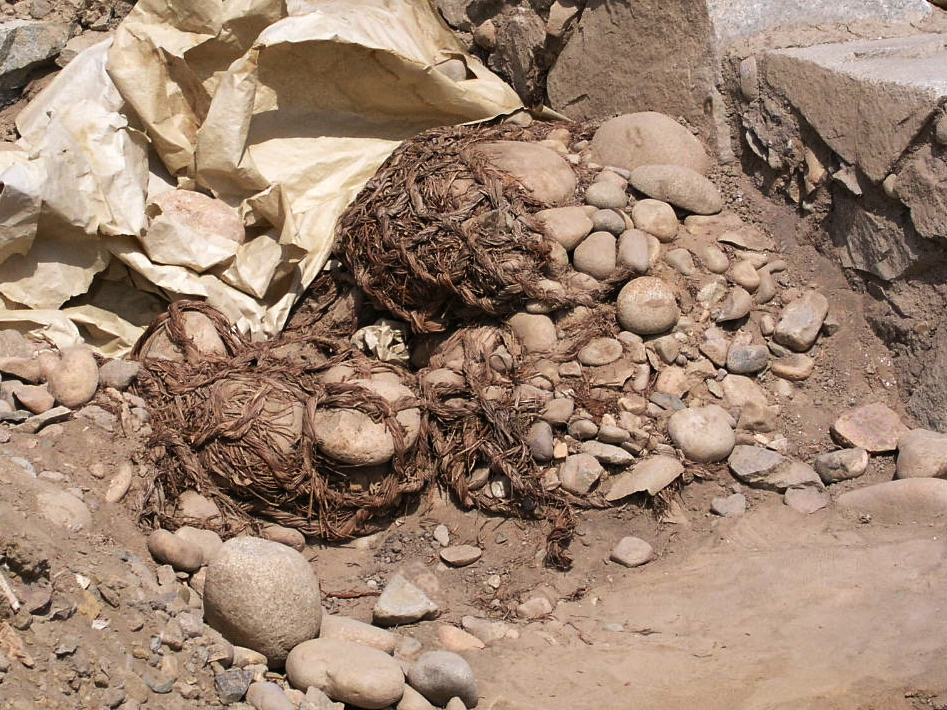 Pirámides en Caral, Valle de Supe, Region Lima, Peru.